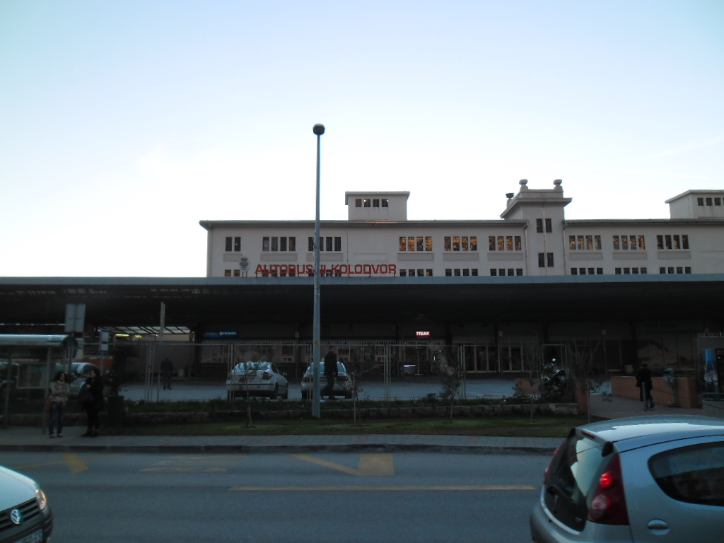 Autobusni kolodvor Dubrovnik na Kantafigu